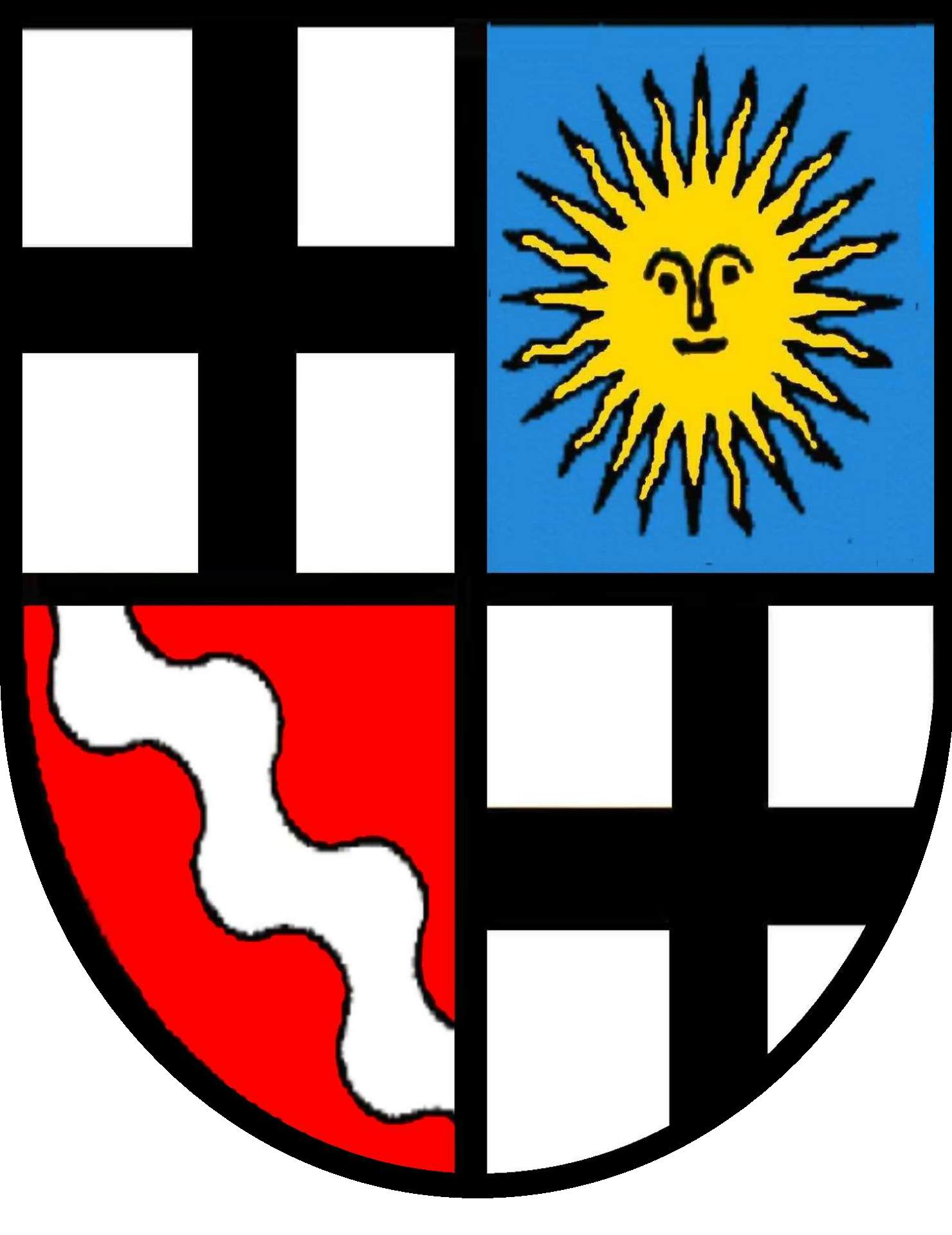 Wappen Eduard Schick (1906-2000), Bischof von Fulda 1974-1982